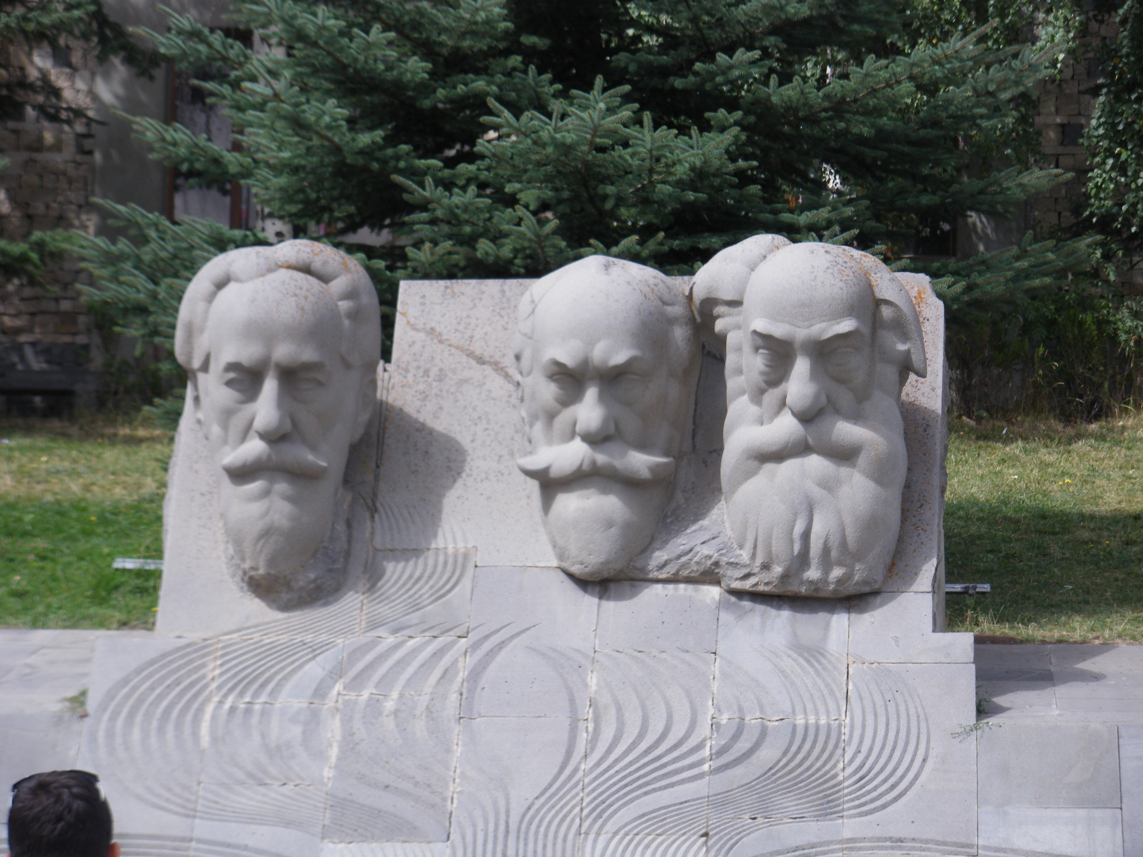 Հուշարձան Լևոն, Հովսեփ և Ռուբեն Օրբելի եղբայրներին 5/4.1